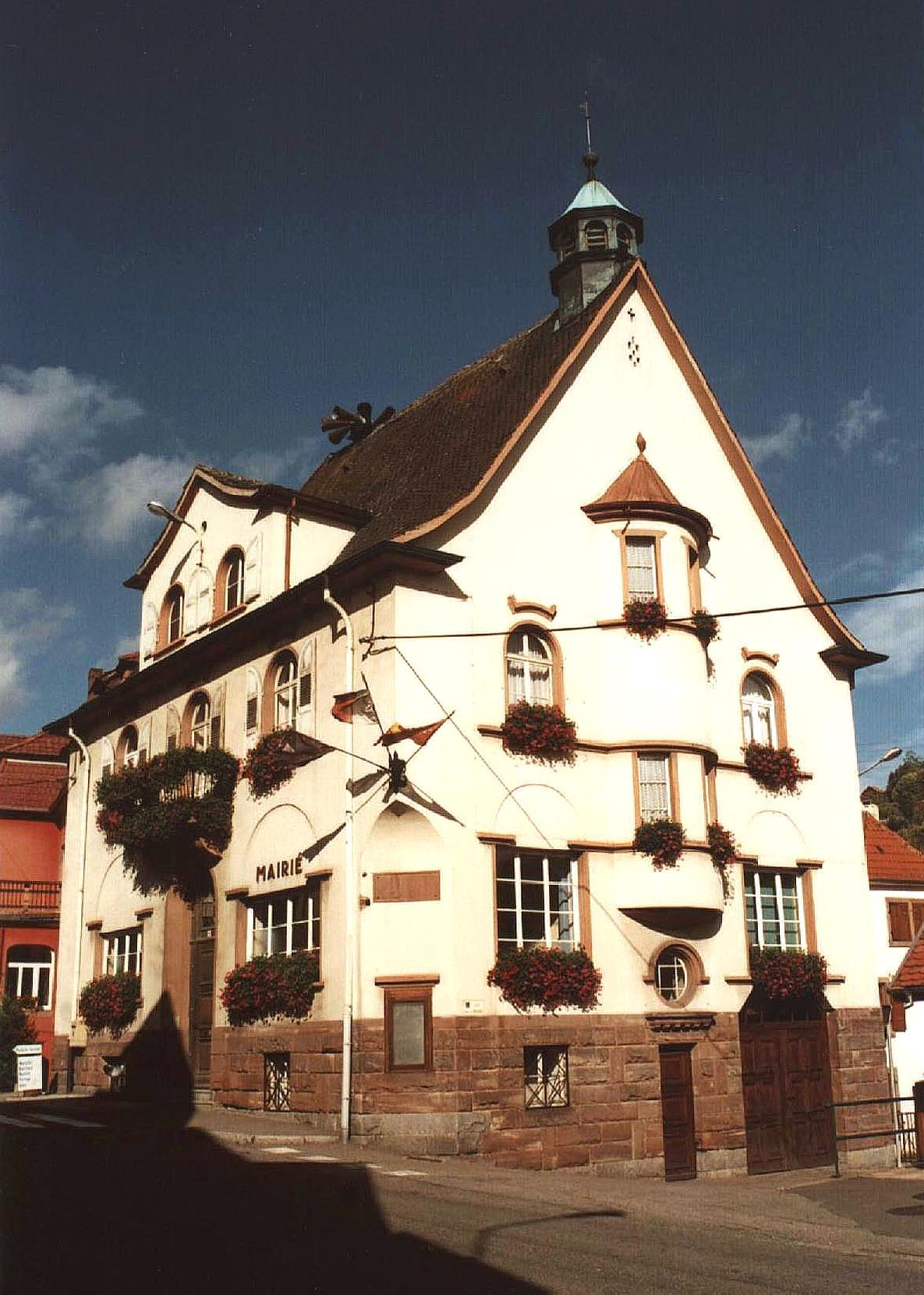 Mairie de Soultzeren Photo : Samuel Wernain (25 octobre 2006).